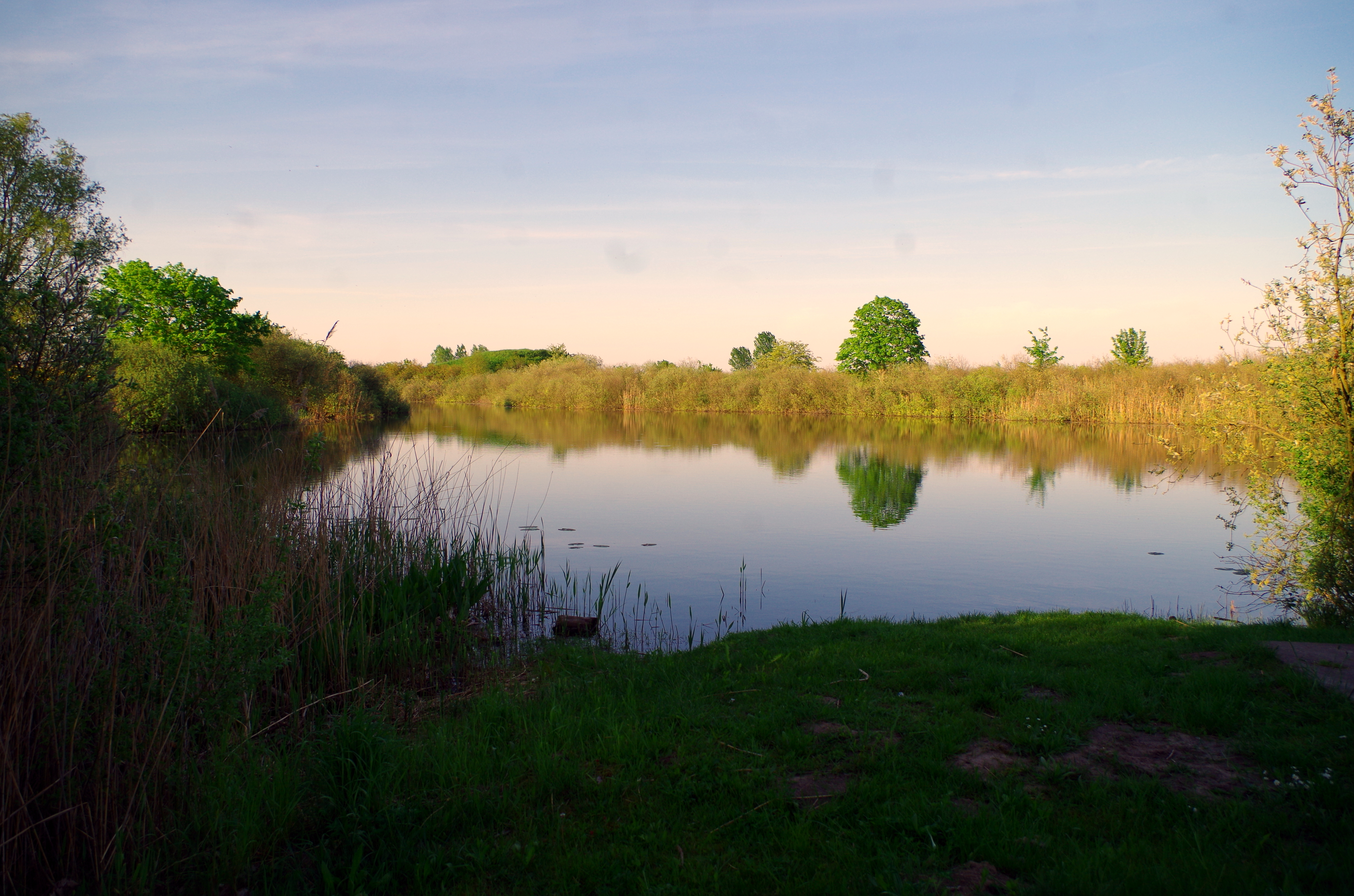 Sicht auf den Darschkower See